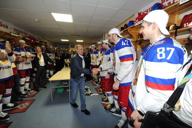 Финальный матч чемпионата мира по хоккею